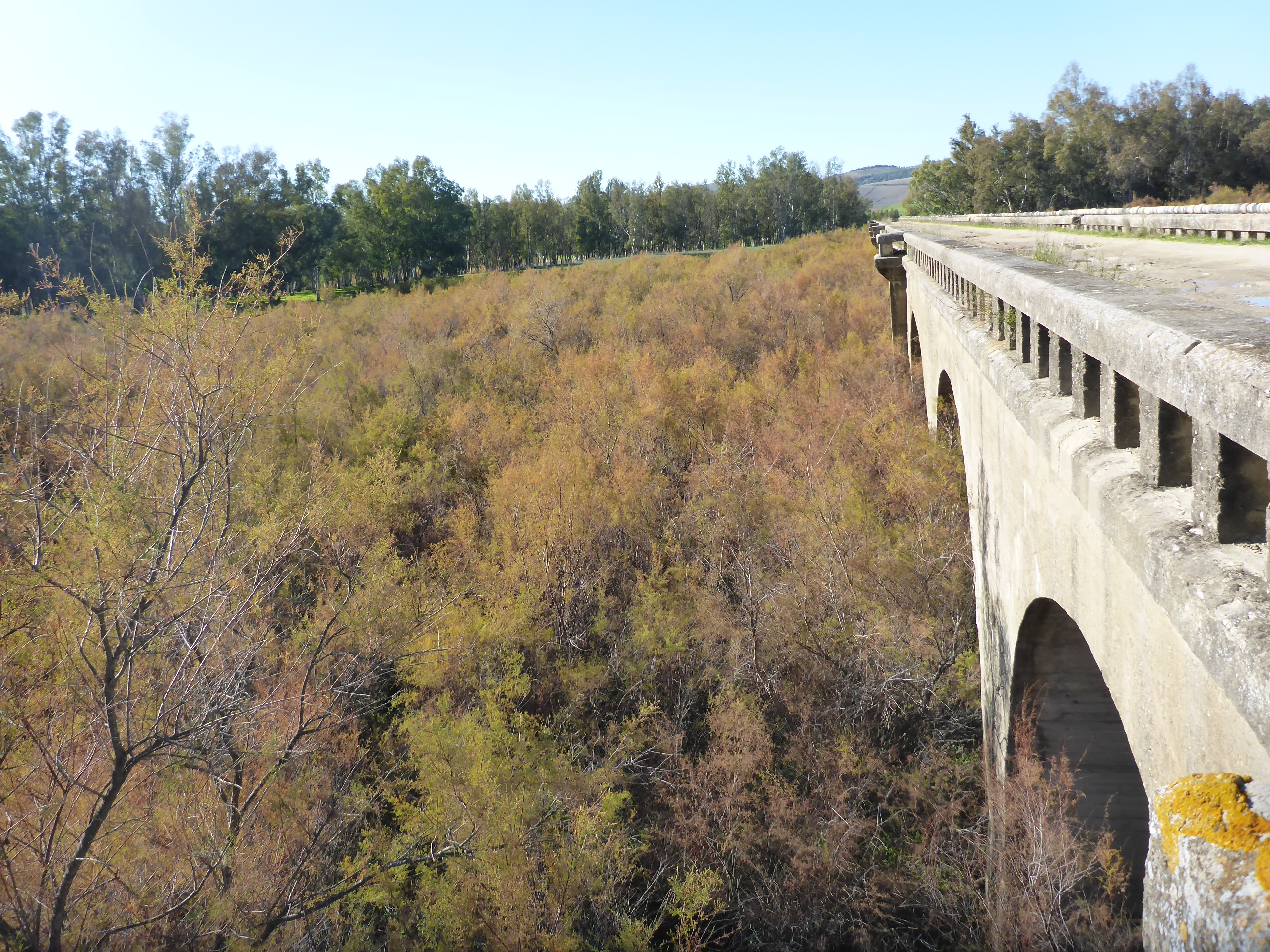 Vía Verde de la Sierra (tramo Bornos-Coto de Bornos). España